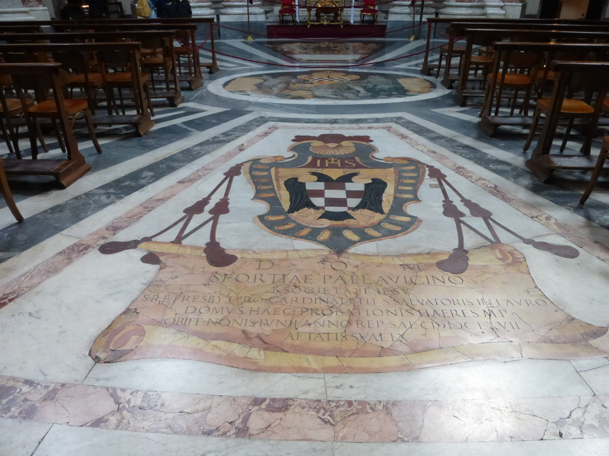 Roma, sant'Andrea al Quirinale, tomba del cardinale Pietro Sforza Pallavicino